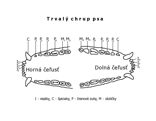 Popis: Schematické znázornenie chrupu psa Zdroj: vlastný obrázok inšpirovaný obrázkom č. 2 na strane 23 z knihy: Dostál, J.: Genetika v kynologické praxi. Dona. 1995. ISBN 80-85463-58-X) Dátum: 11.01.2006 Autor: Prskavka Povolenie: PD Iné verzie tohto súboru: nie